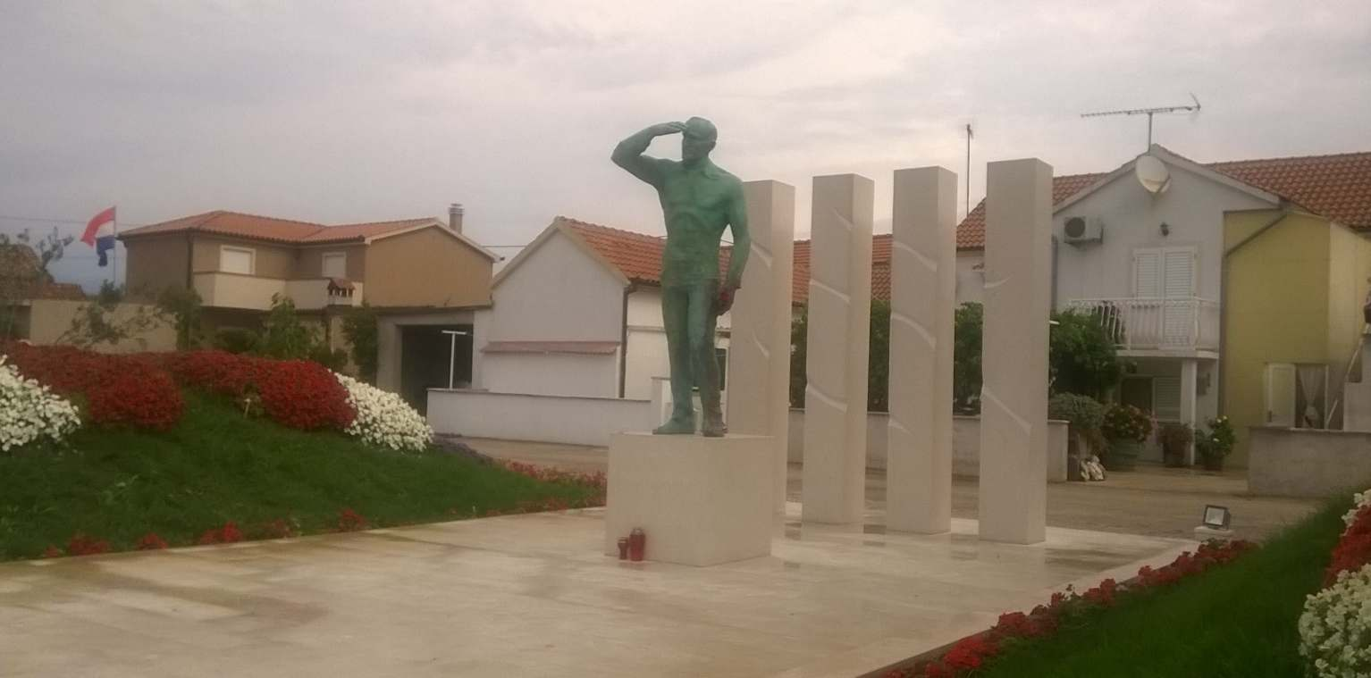 Spomenik Miri Barešiću